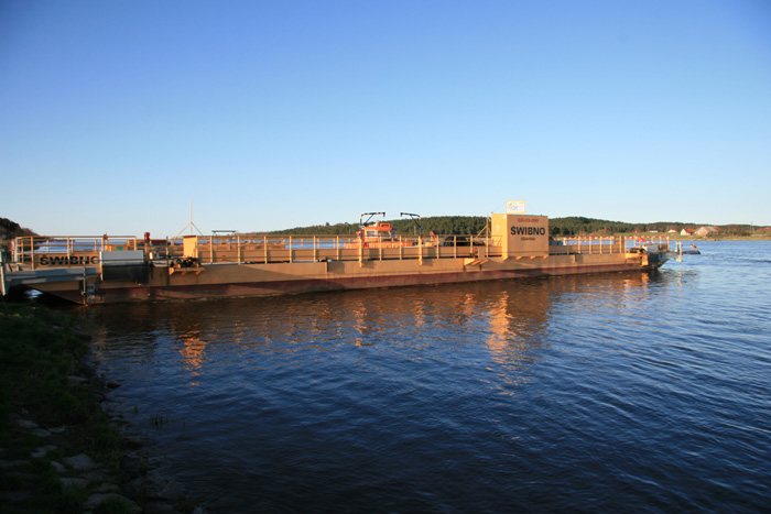 Gdańsk-prom Świbno 2007